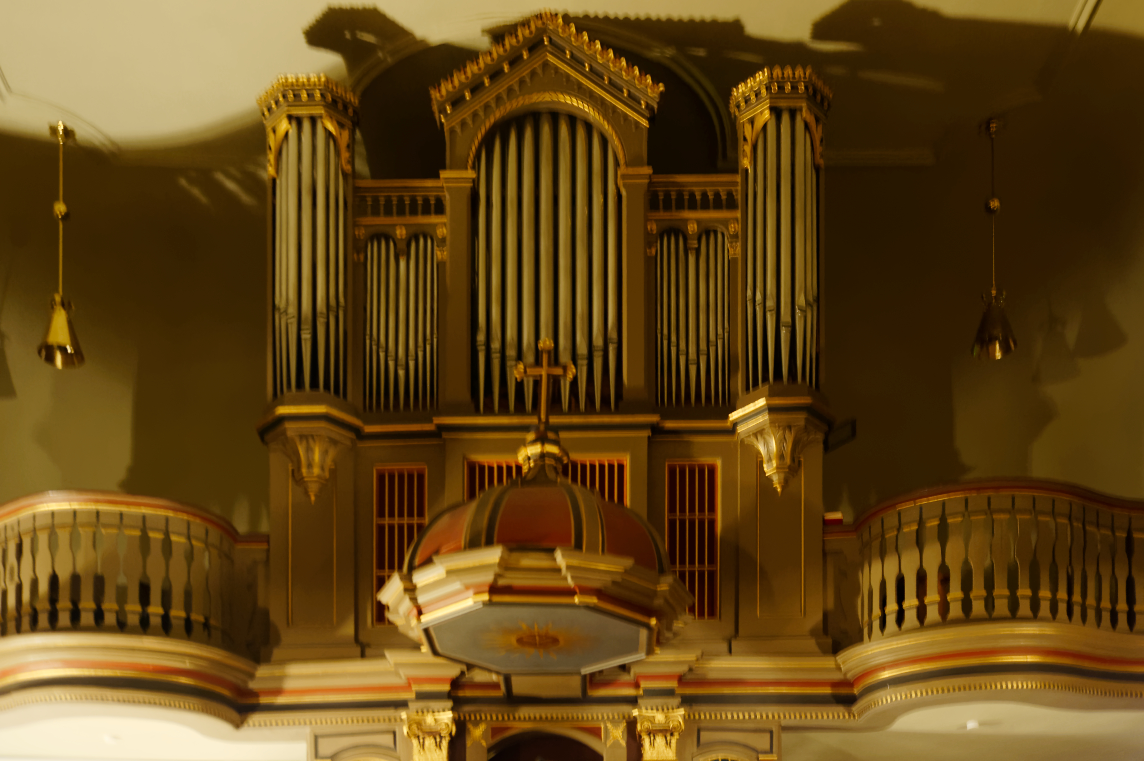 Stammtische Sauerland - Neuenrade